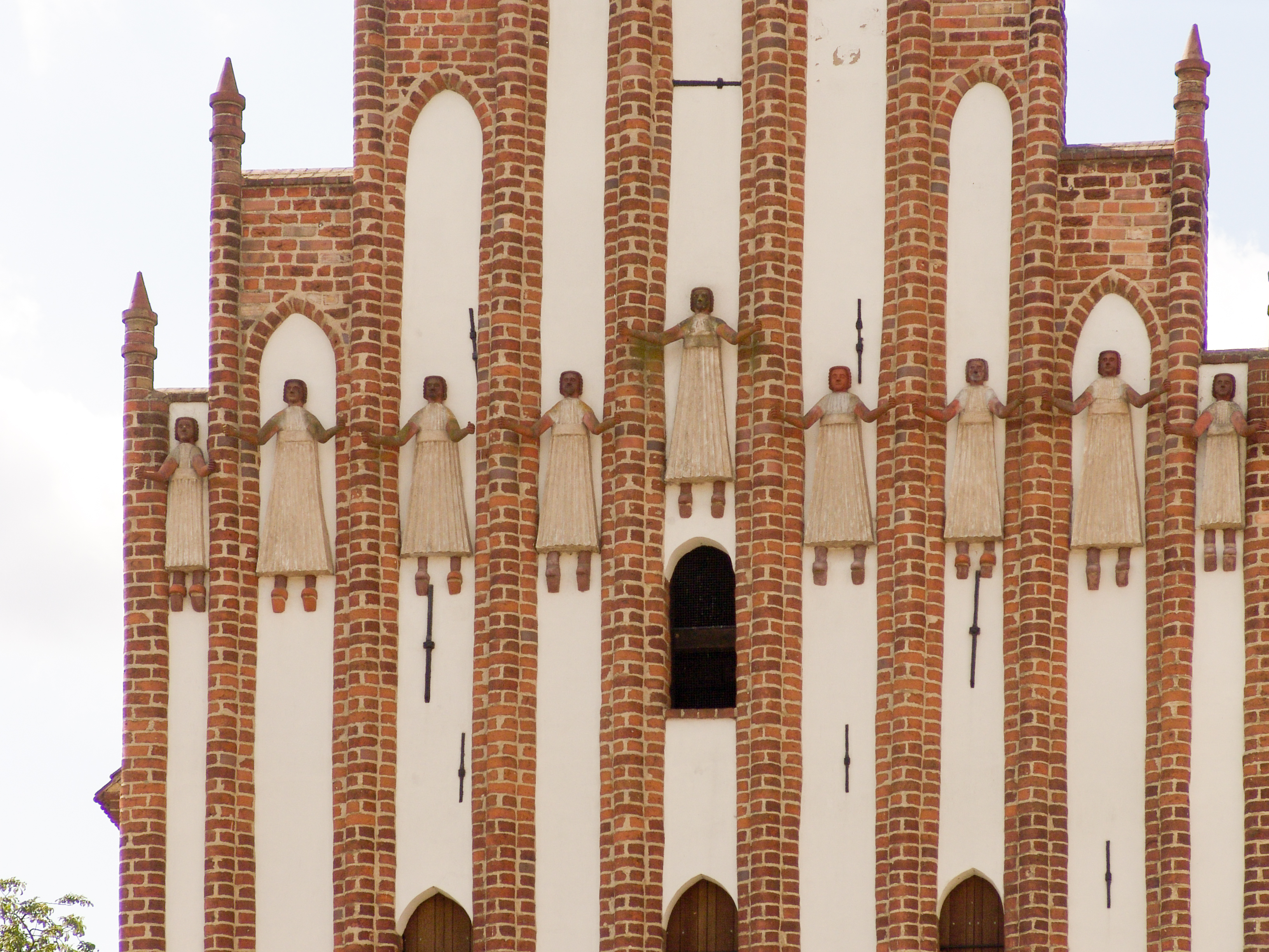 Stadttor in Neubrandenburg